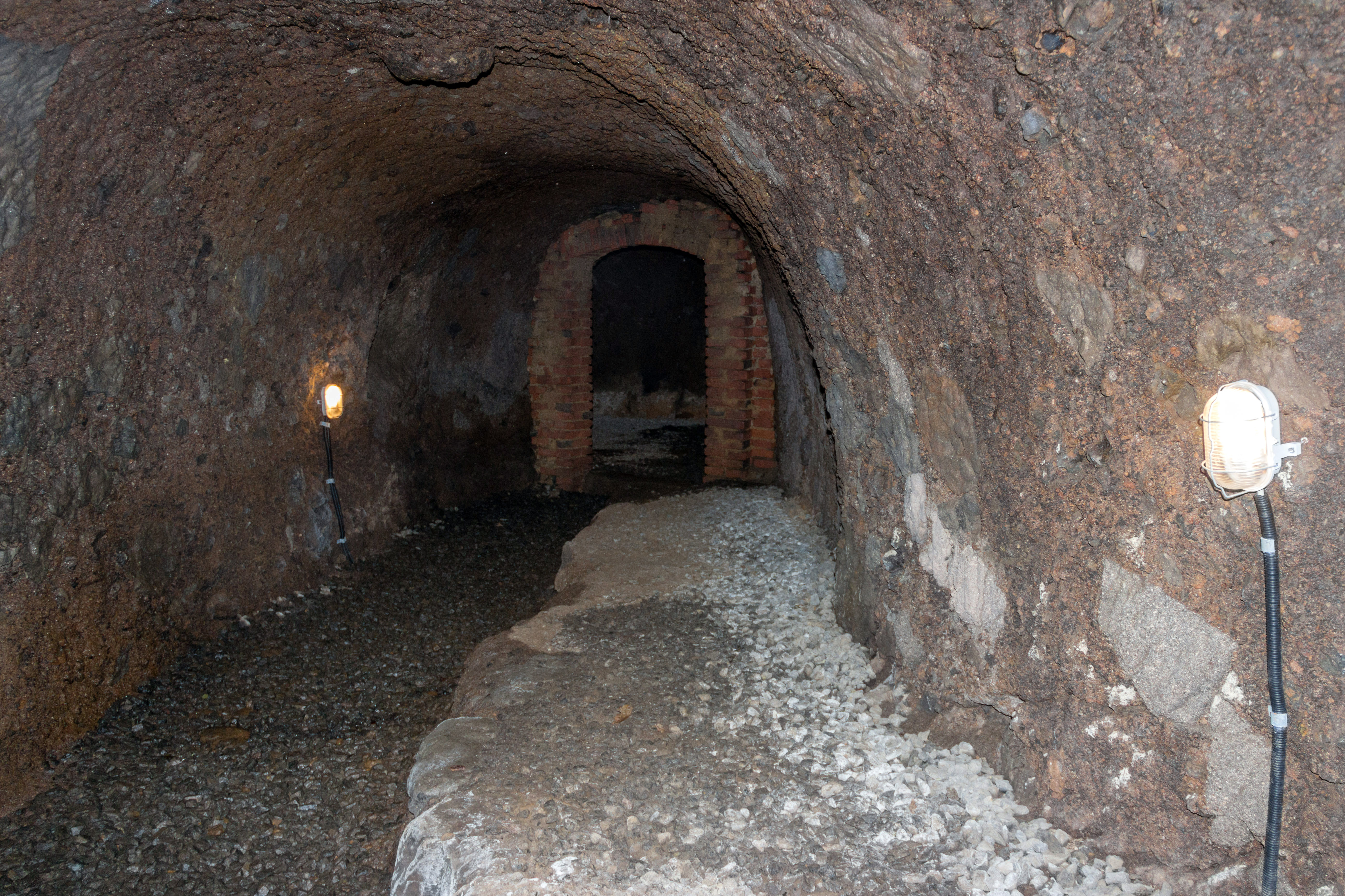 Felsenkeller Parkstein, Geotop 374A041